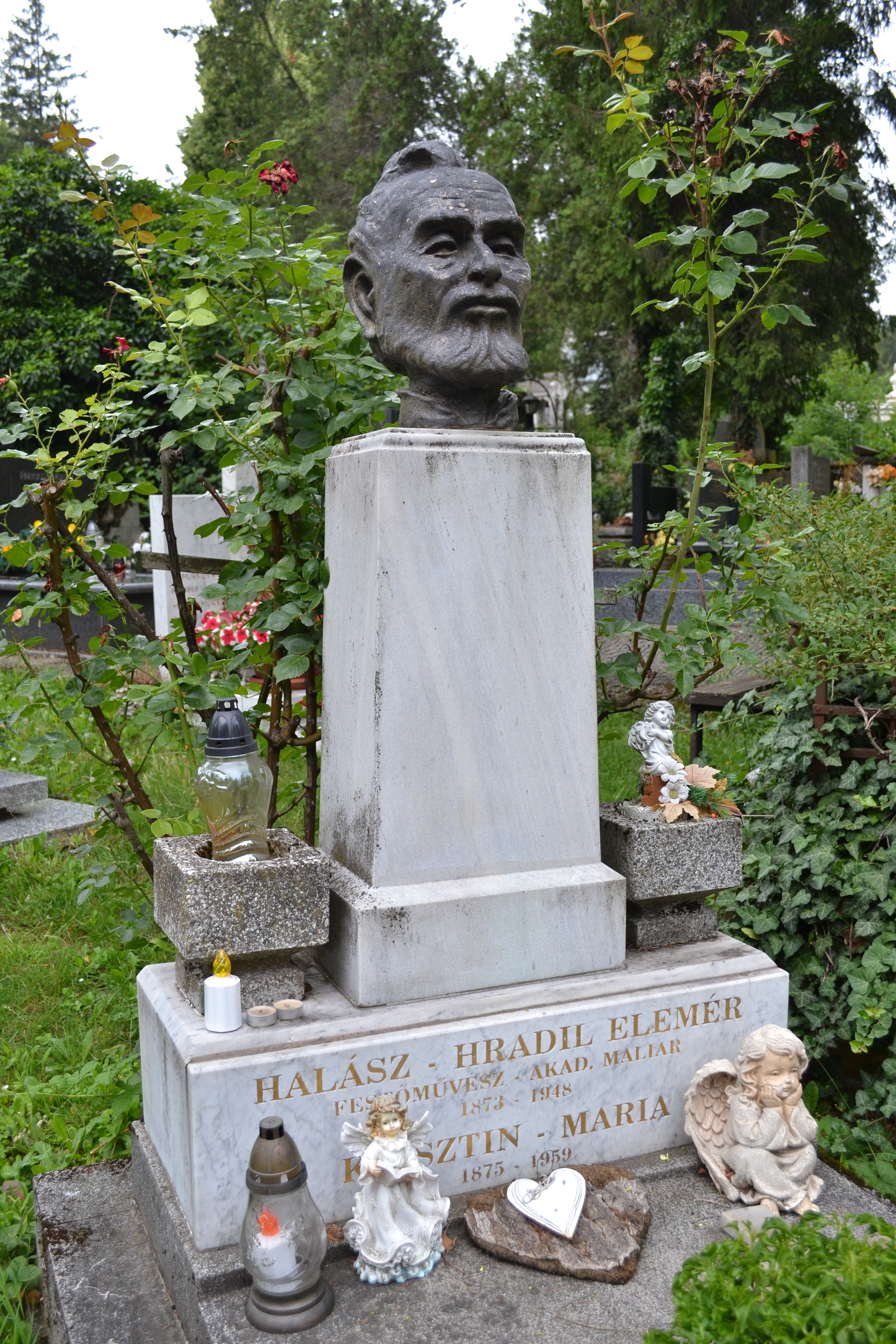 Hrob akademického maliara Eleméra Halásza-Hradila v Košiciach